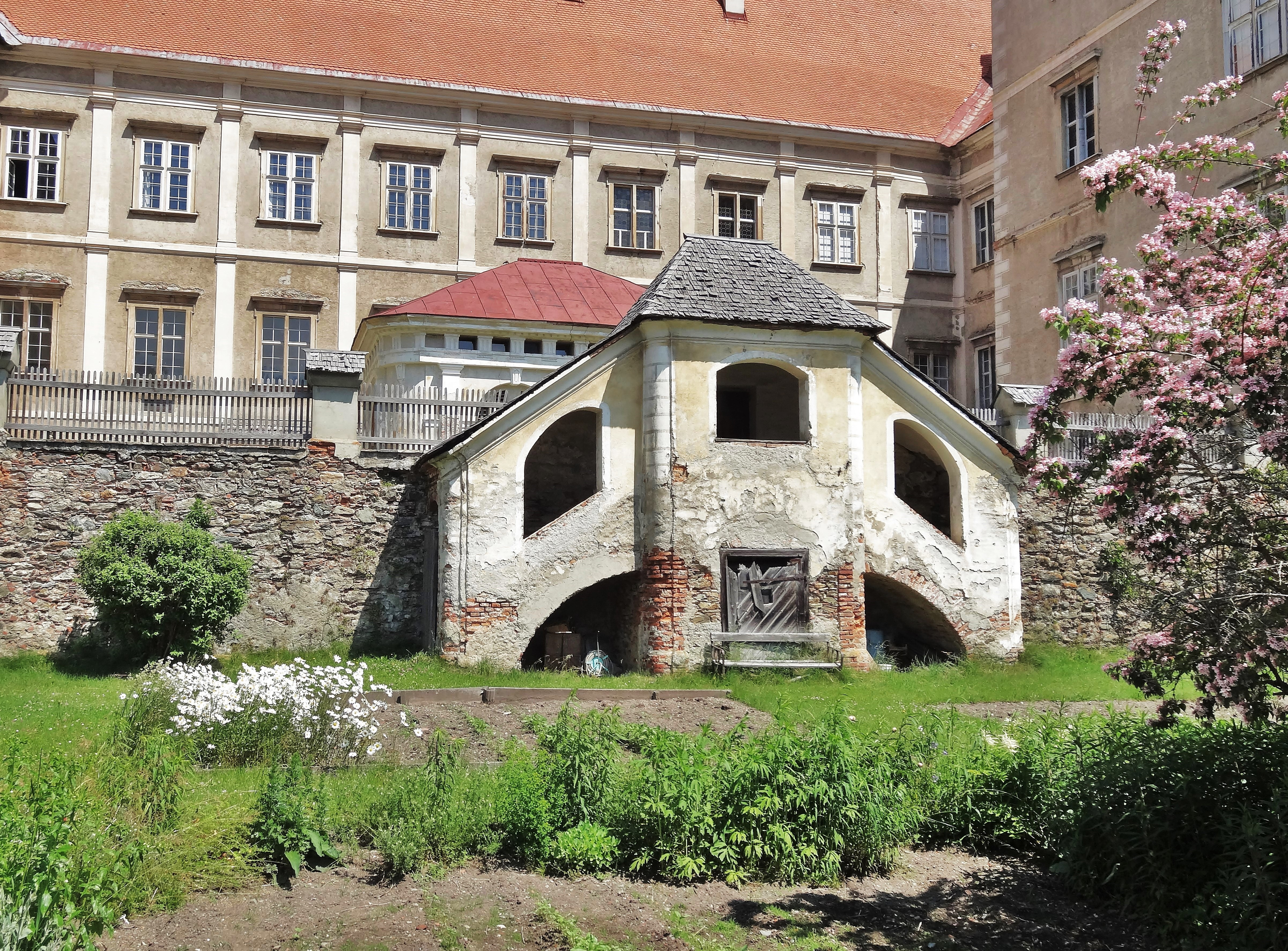 Benediktinerstift St. Lambrecht, Blick in den ehemaligen Kräutergarten